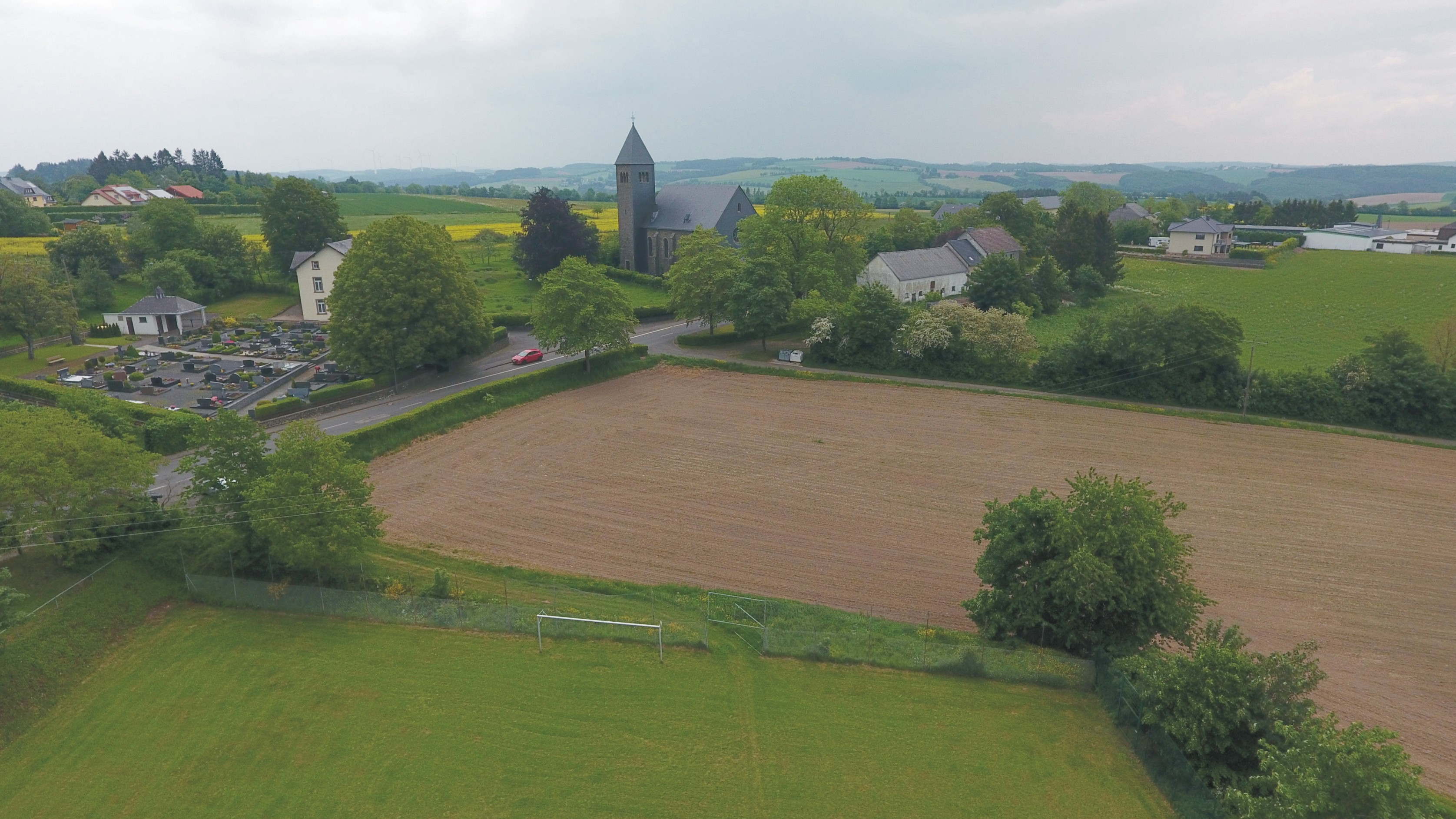 54689 Olmscheid. Die Namensendung -scheid deutet auf eine Entstehung des heutigen Ortes in der späten mittelalterlichen Rodungsphase hin. Die erste urkundliche Nennung stammt aus 1282 als Oelmerscheit. In der Feudalzeit gehörte der Ort zur Meierei Eschfeld-Arzfeld in der Herrschaft Dasburg, Quartier Vianden. Aufnahme von 2018.